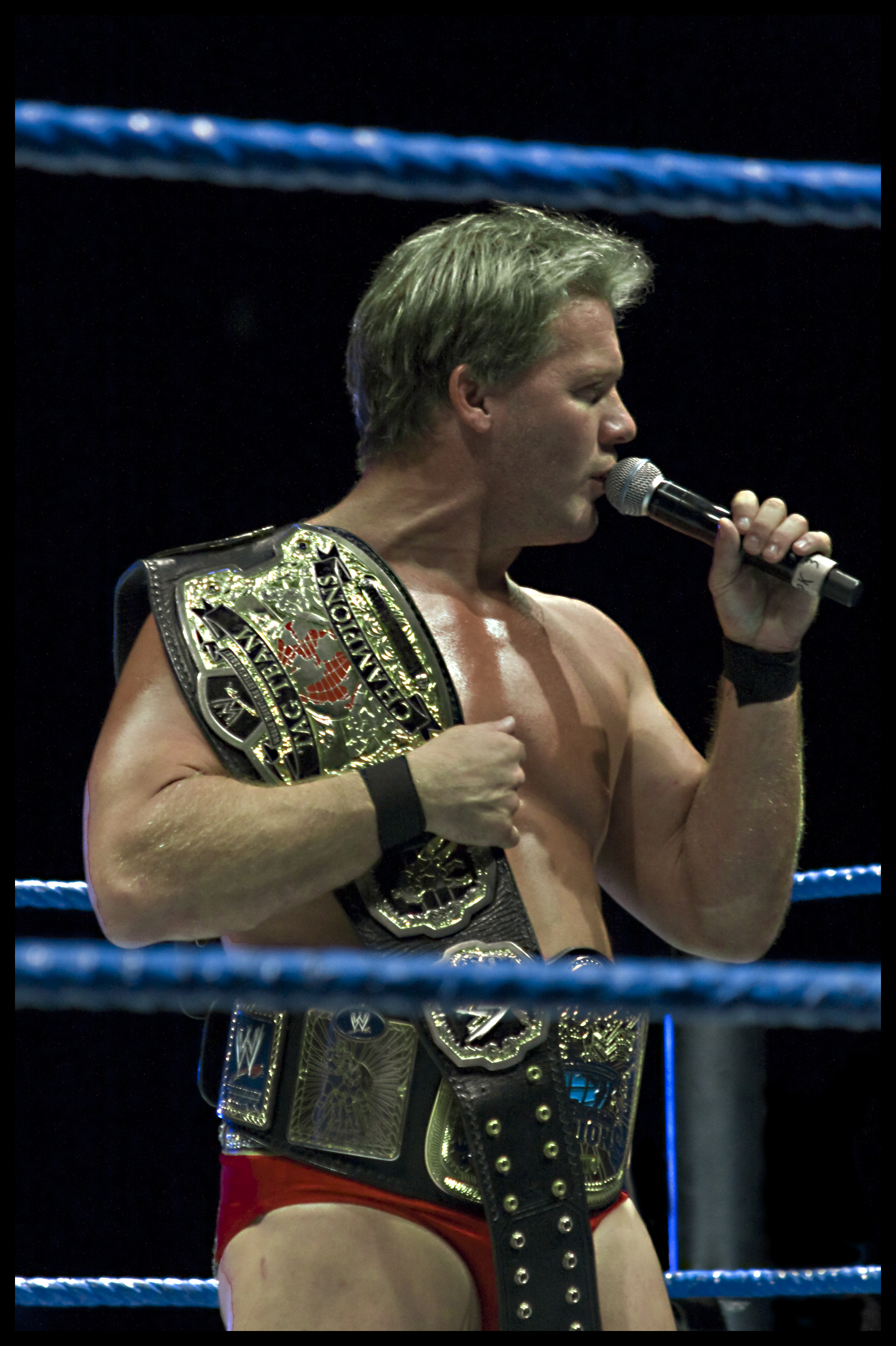 chris jericho, campeón de parejas unificadas